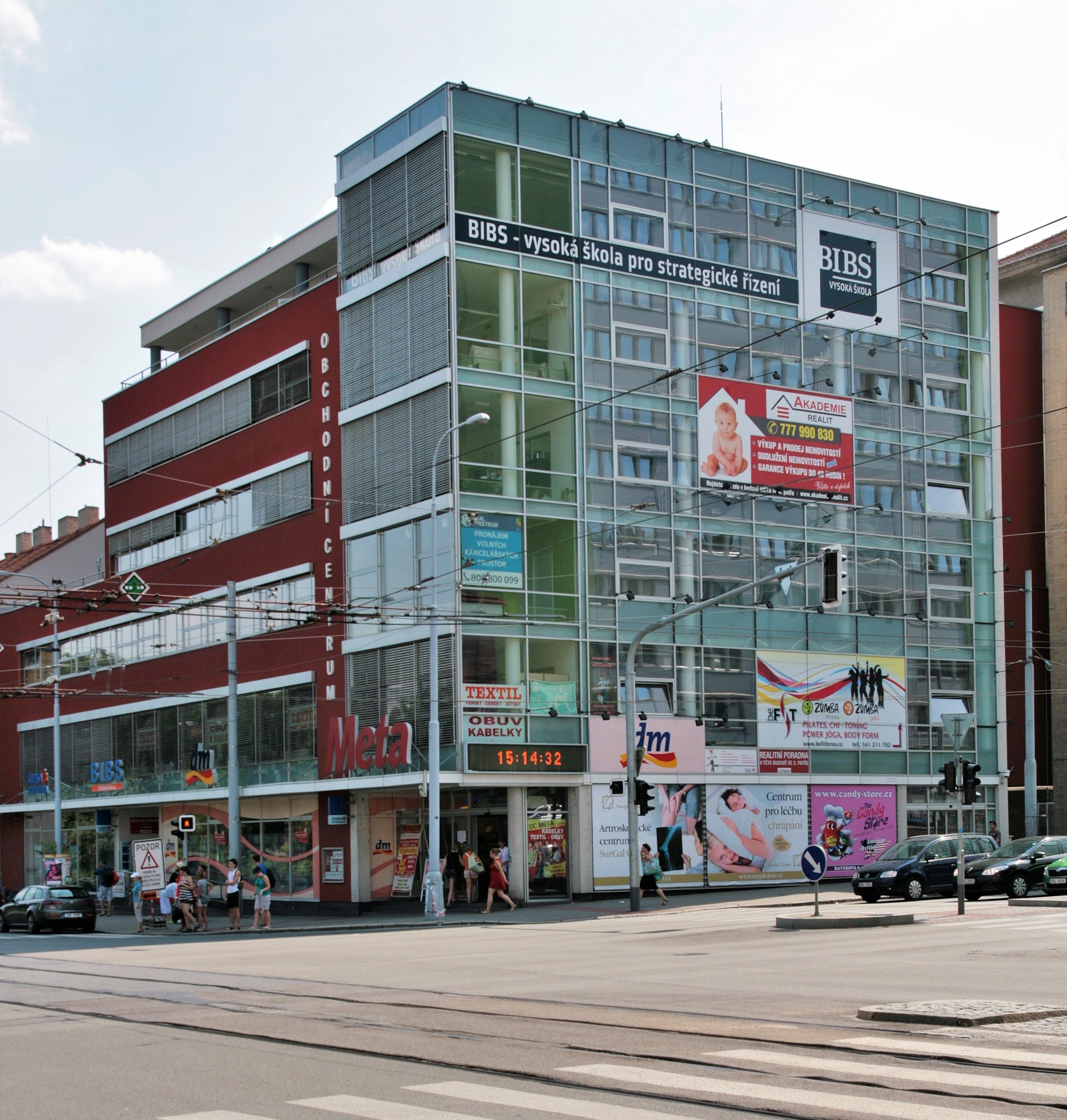 Obchodní a administrativní dům na rohu ulic Lidická a Kotlářská, adresa Lidická 81, Brno-Veveří. Pohled napříč křižovatkou od severovýchodu.